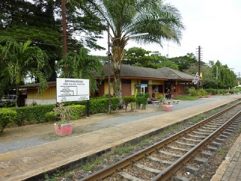 อาคารสถานีรถไฟชุมทางหนองปลาดุก